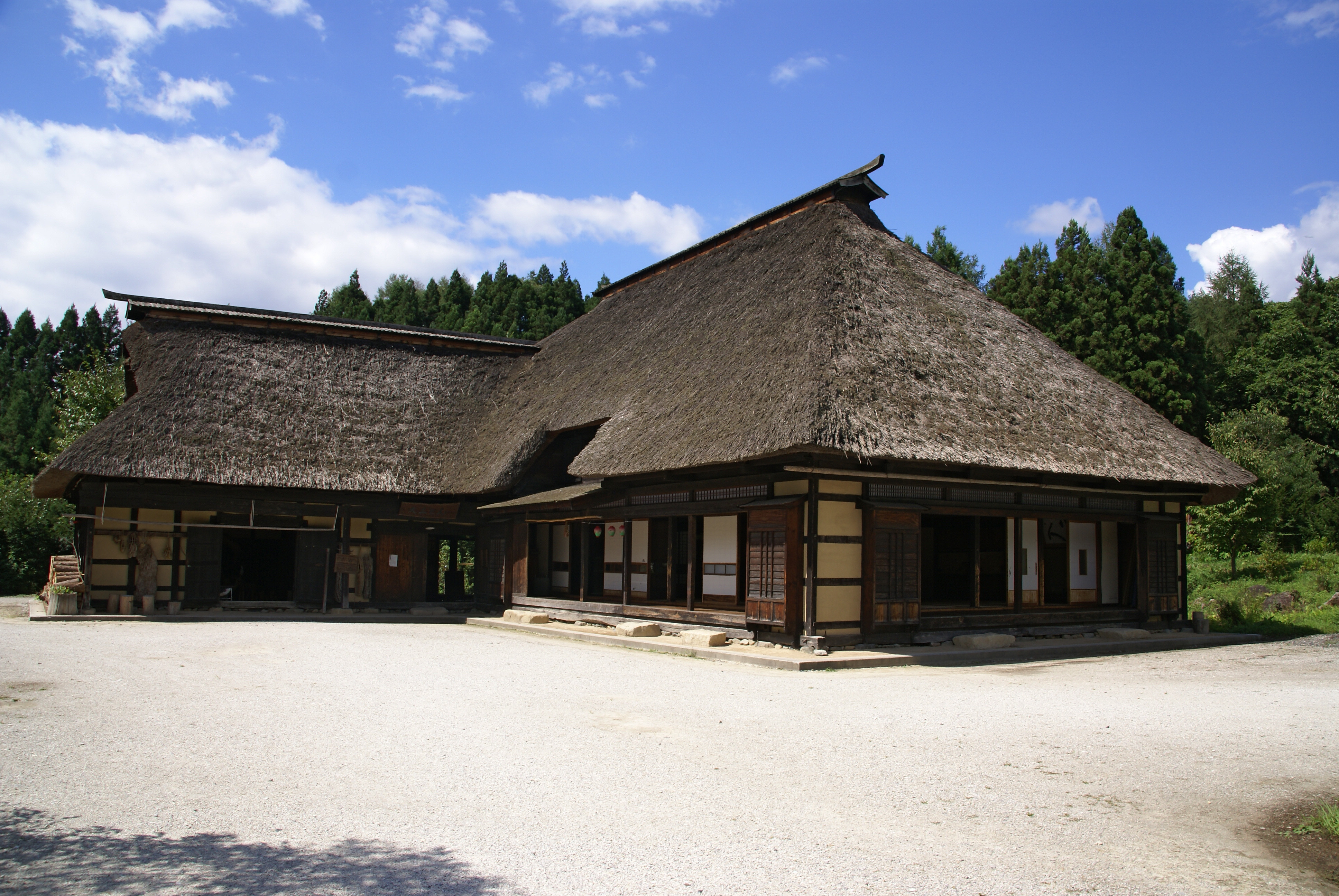 Tono Furusato-mura in Tono, Iwate prefecture, Japan